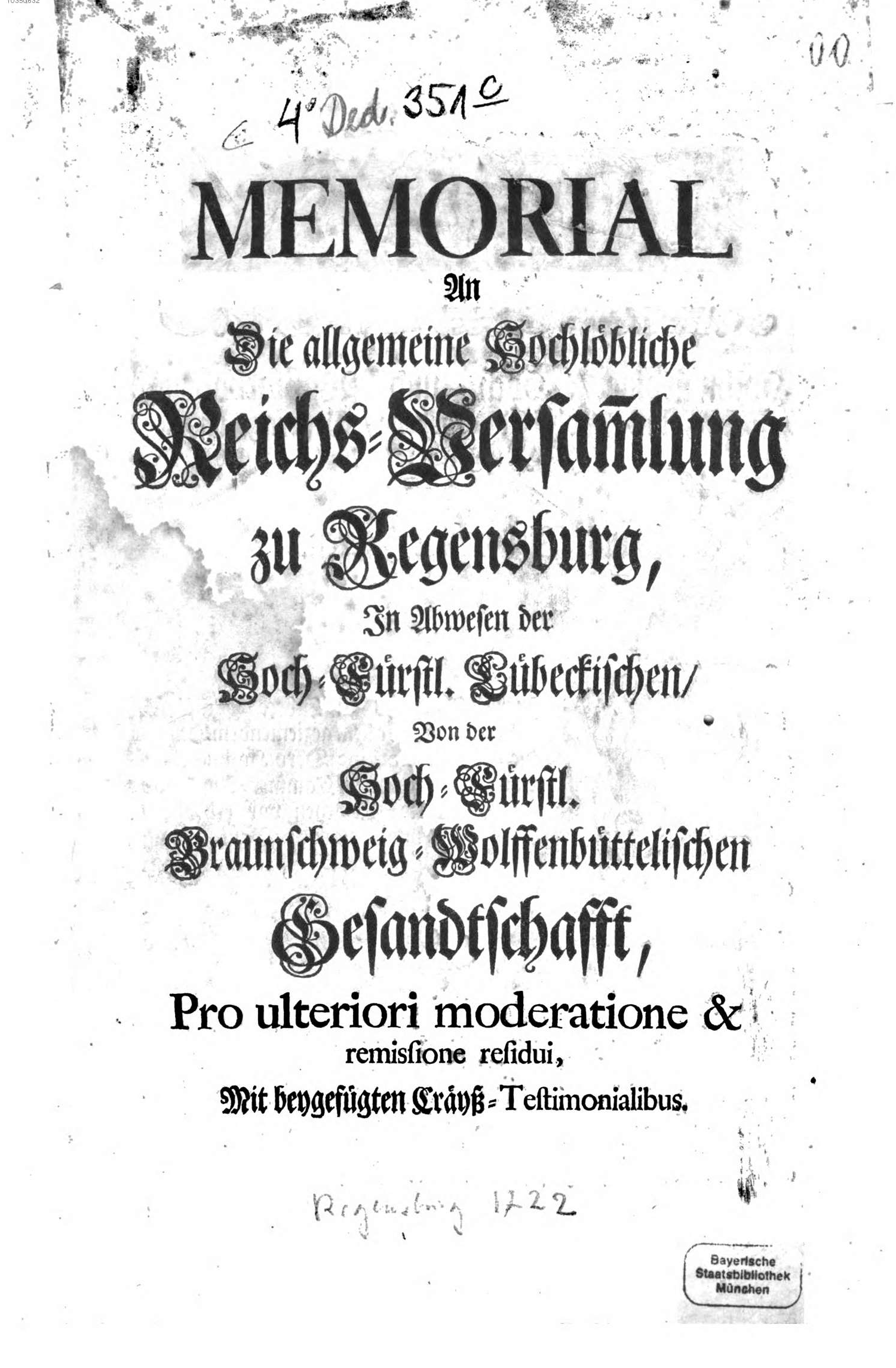 Joachim von Brawe: Memorial An Die allgemeine Hochlöbliche Reichs-Versammlung zu Regensburg, In Abwesen der Hoch-Fürstl. Lübeckischen / Von der Hoch-Fürstl. Braunschweig-Wolffenbüttelischen Gesandtschafft, Pro ulteriori moderatione & remissione residui, Mit beygefügten Cräyß-Testimonialibus. Regensburg den 30. Octobr. 1722. (fol. 1r)